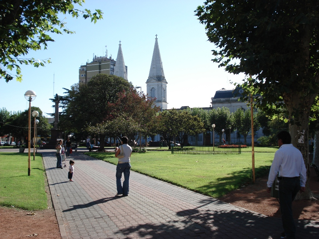 Plaza Coronel Olavarría ubicada en la Ciudad de Olavarría en la Provincia de Buenos Aires, Argentina. En el fondo se puede observar la Iglesia San José.